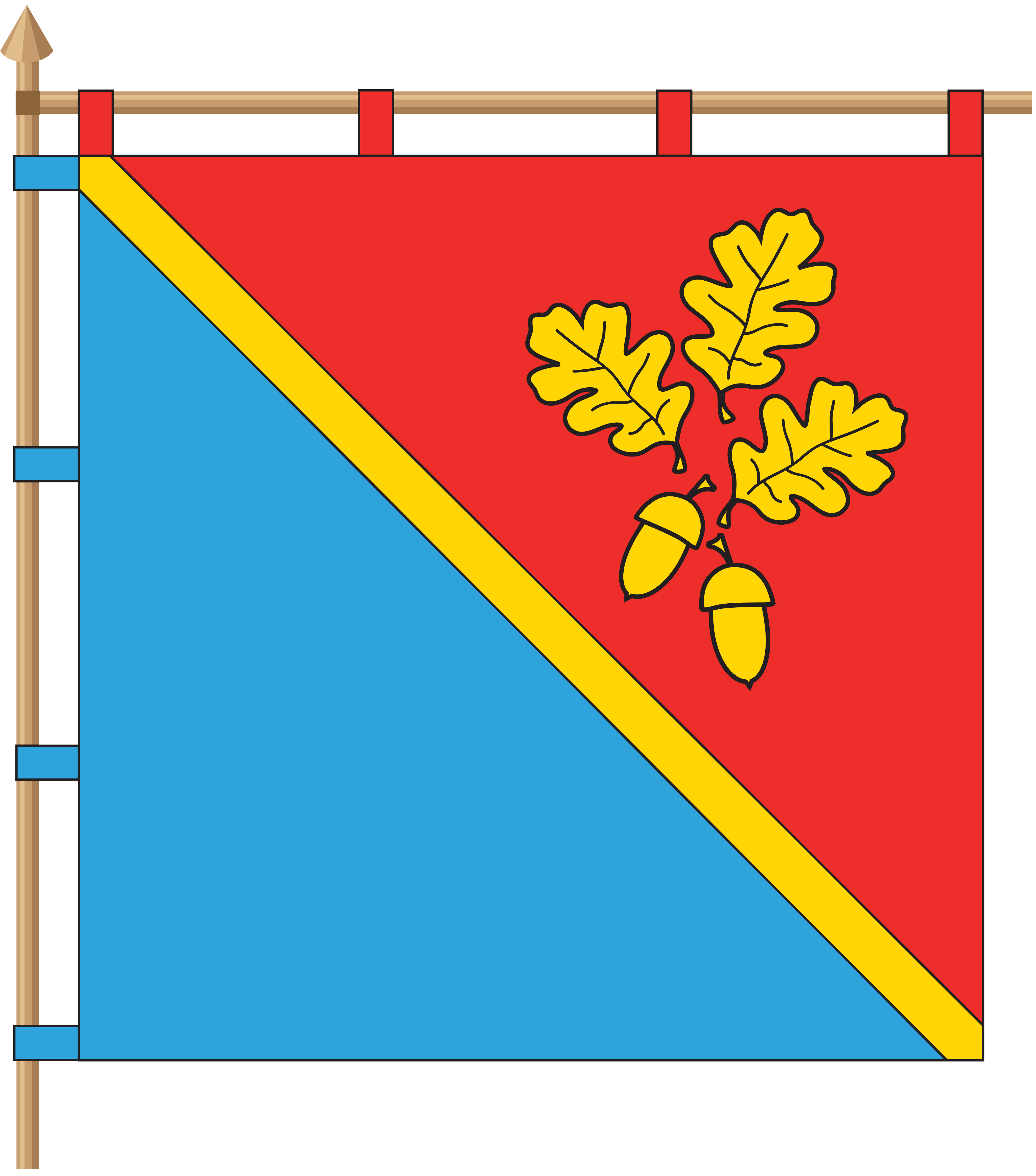 Прапор Лихівської ОТГ